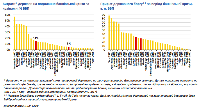 Витрати різних економік на подолання банківської кризи в різних роках по країнах